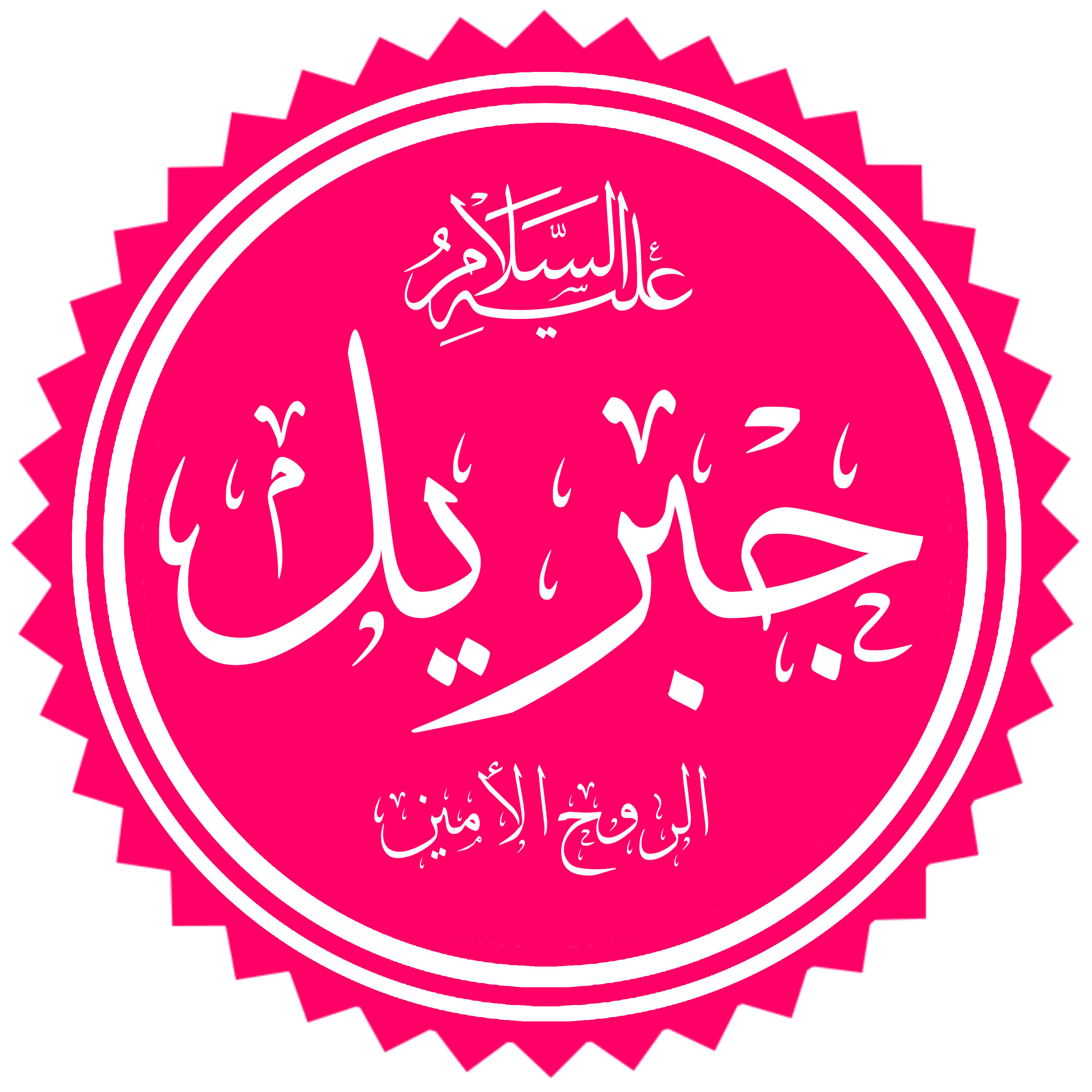 تخطيط كلمة جبريل عليه السلام الروح الأمين باللغة العربية